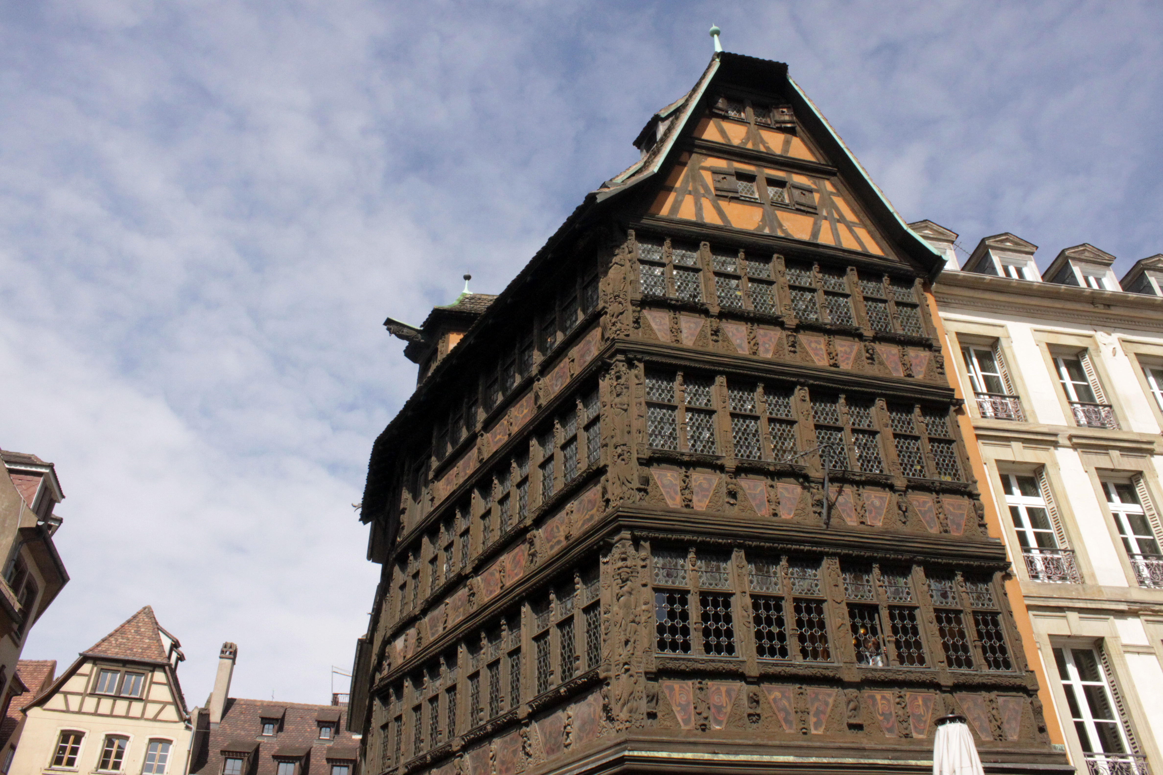 Haus Kammerzell in Straßburg/Elsass, vom Münsterplatz aus gesehen.